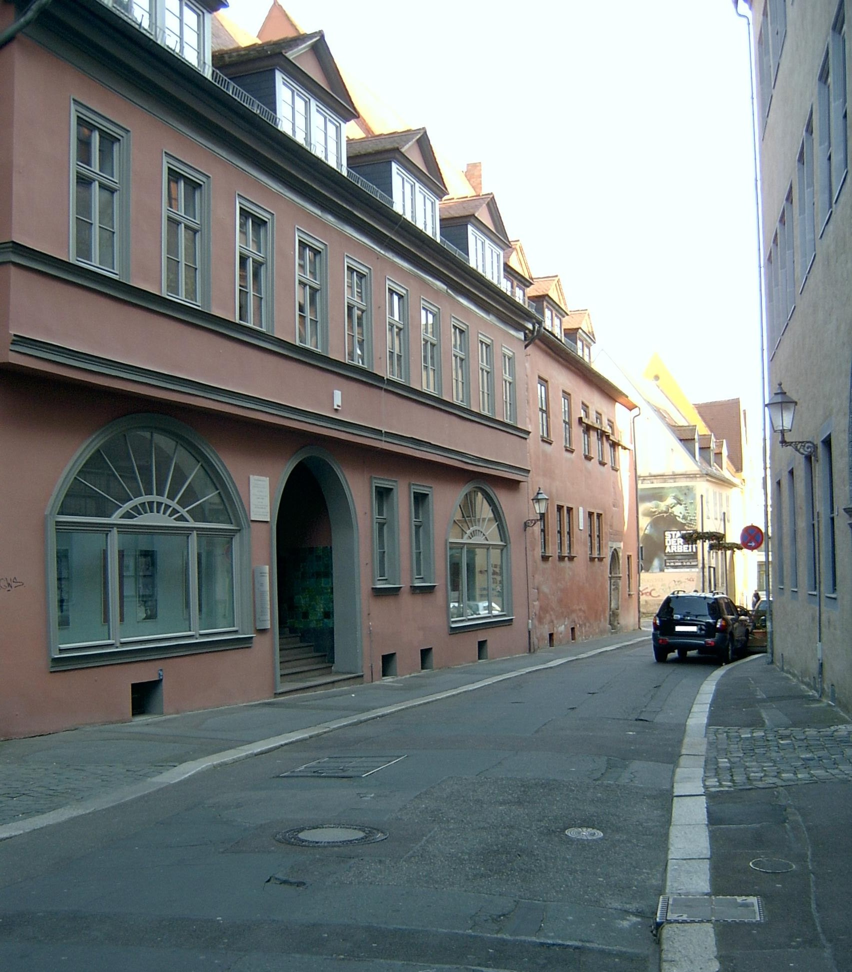 Die Große Märkerstraße in Halle (Saale), Blick aus Richtung Marktplatz. Rechts die Nr. 21/22, links im Vordergrund Nr. 6. dahinter Nr. 7